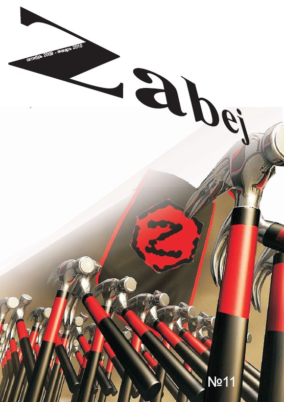 номер 11